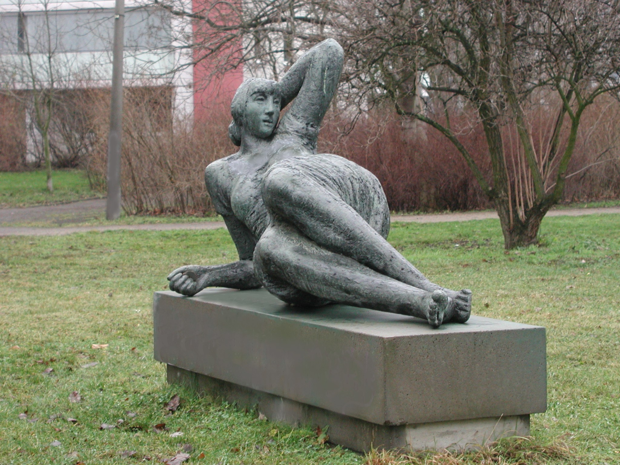 Skulptur "Große Liegende" von Siegfried Krepp im Fennpfuhlpark